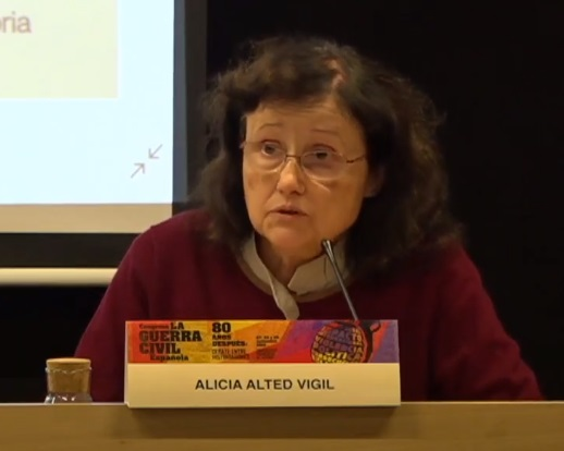 Los exilios de la Guerra Civil. 27, 28 y 29 de noviembre de 2019.